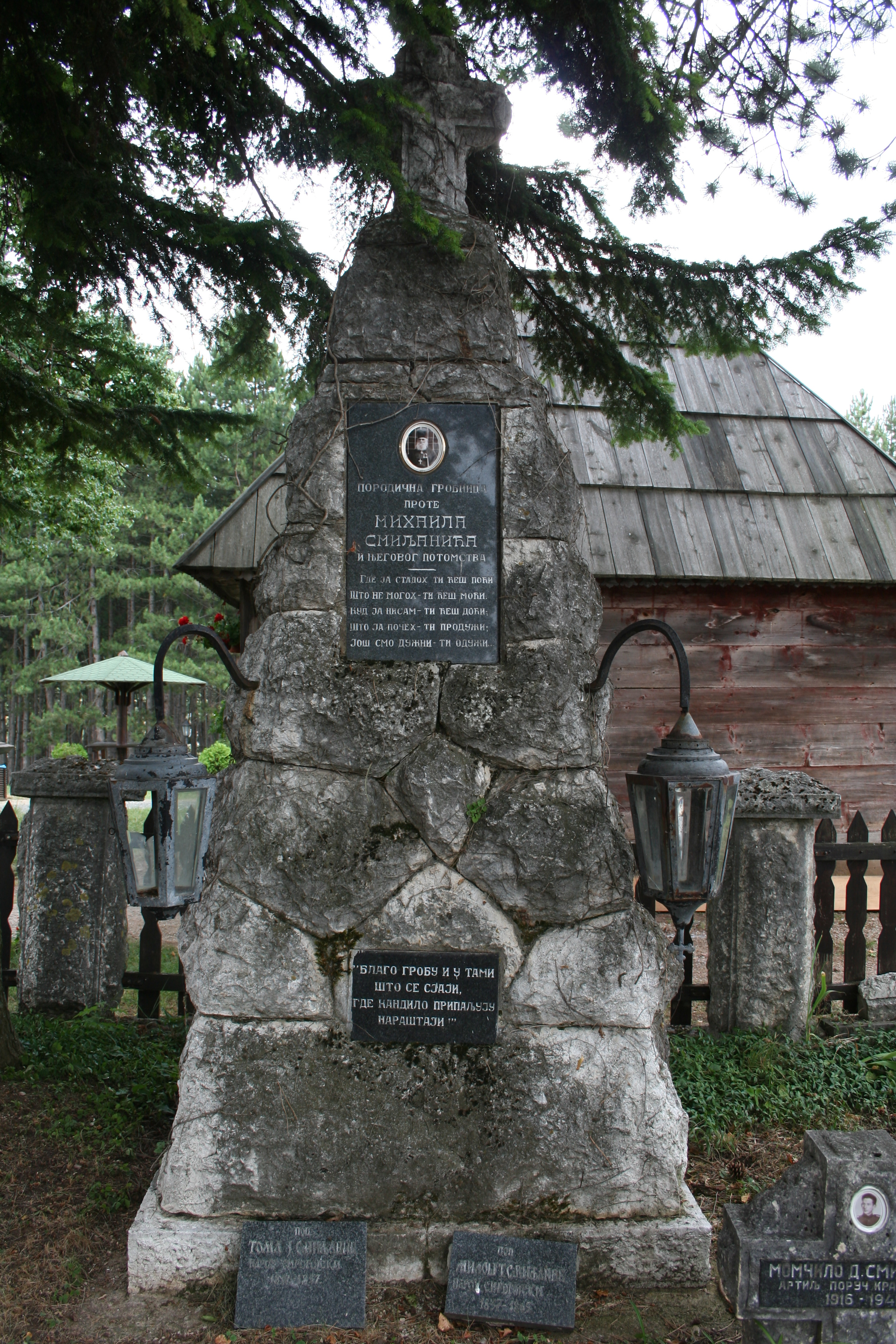 Crkva Svetih apostola Petra i Pavla u Sirogojnu